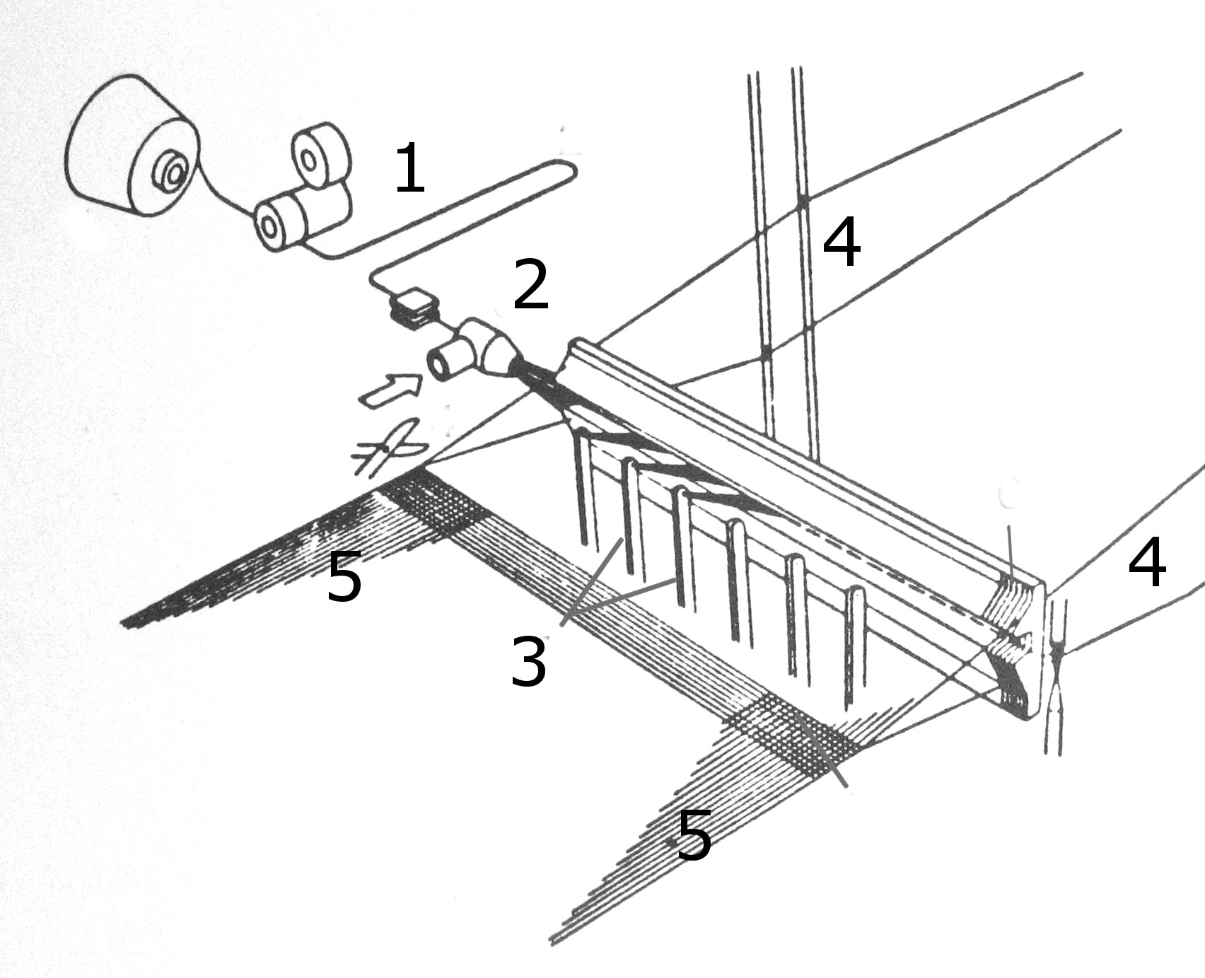 Schema: Luftdüsen-Schussfadeneintrag